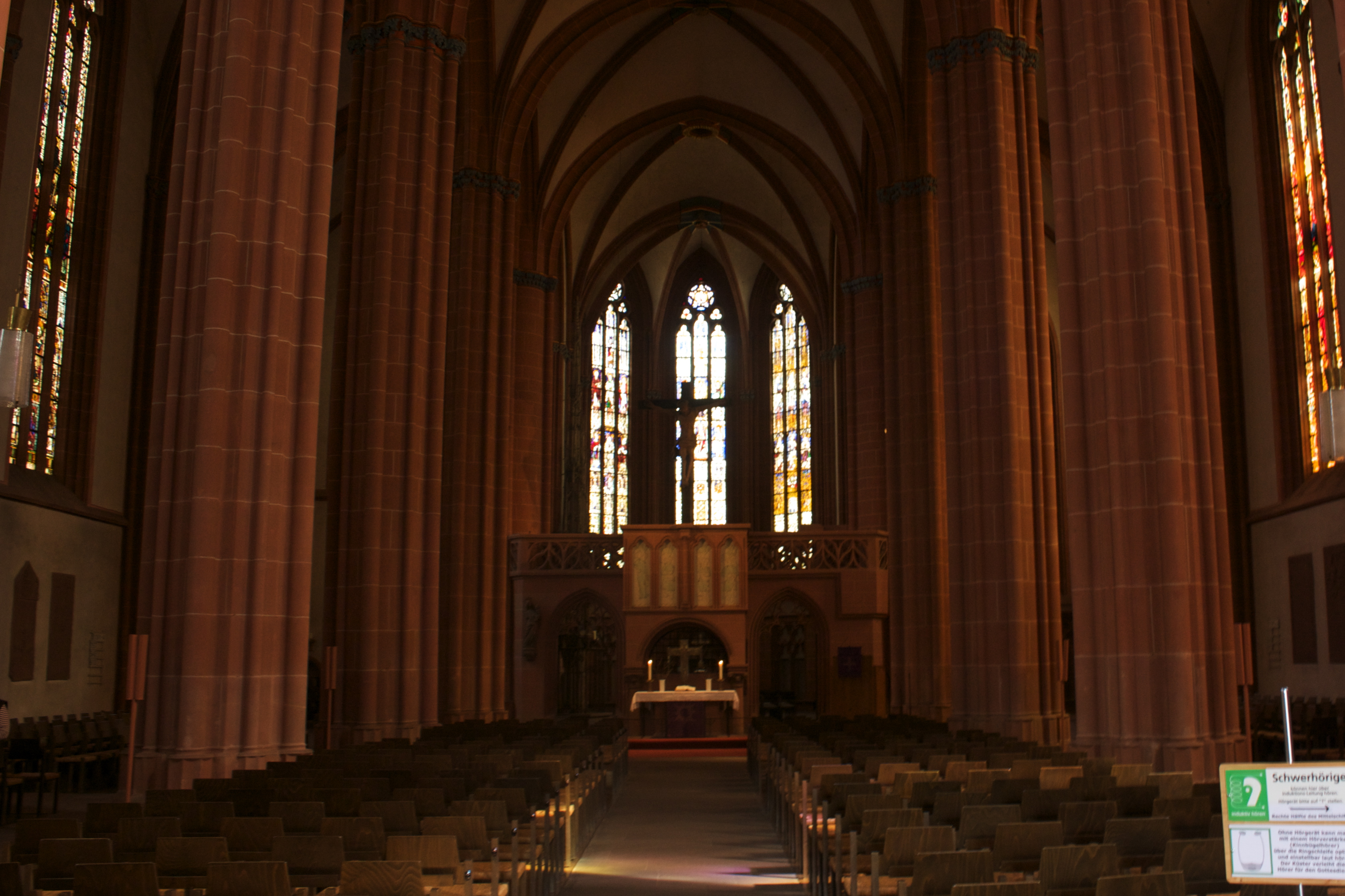 Interior of Stadtkirche Friedberg